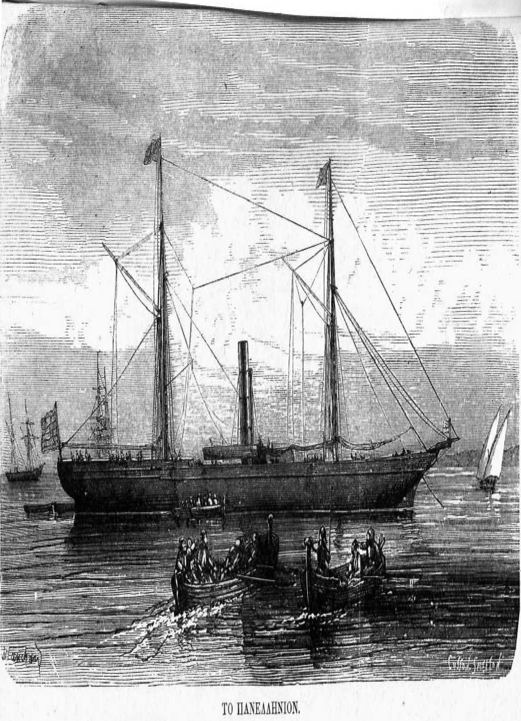 Griechisches Dampfschiff, 19. Jahrhundert